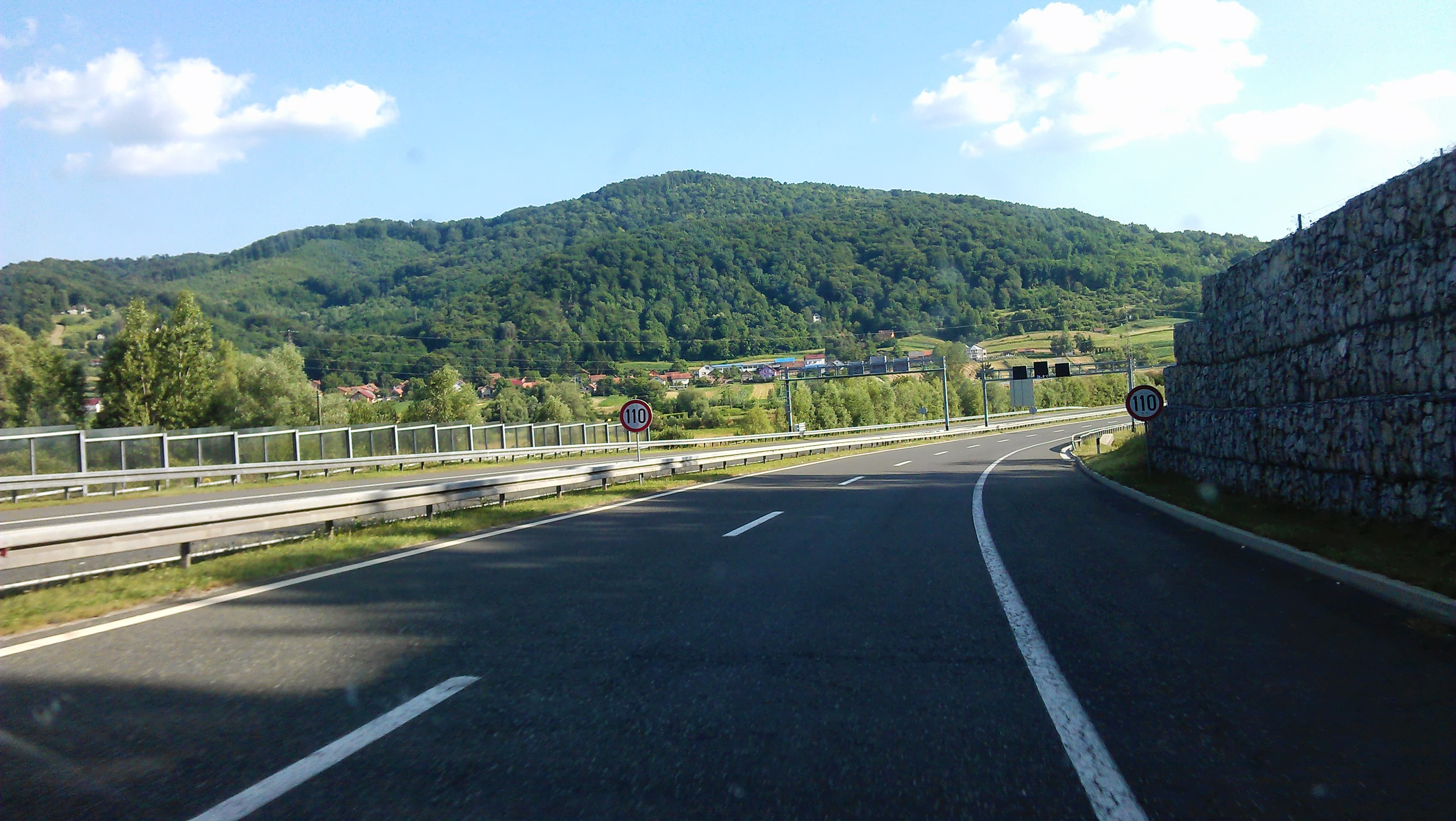 Autoput Hrastovec Toplički